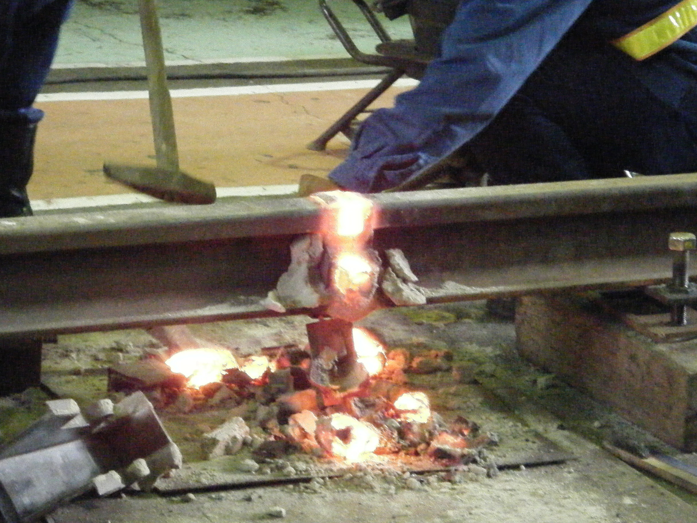 レールの溶接作業（JR北海道 苗穂工場 一般公開時に撮影）